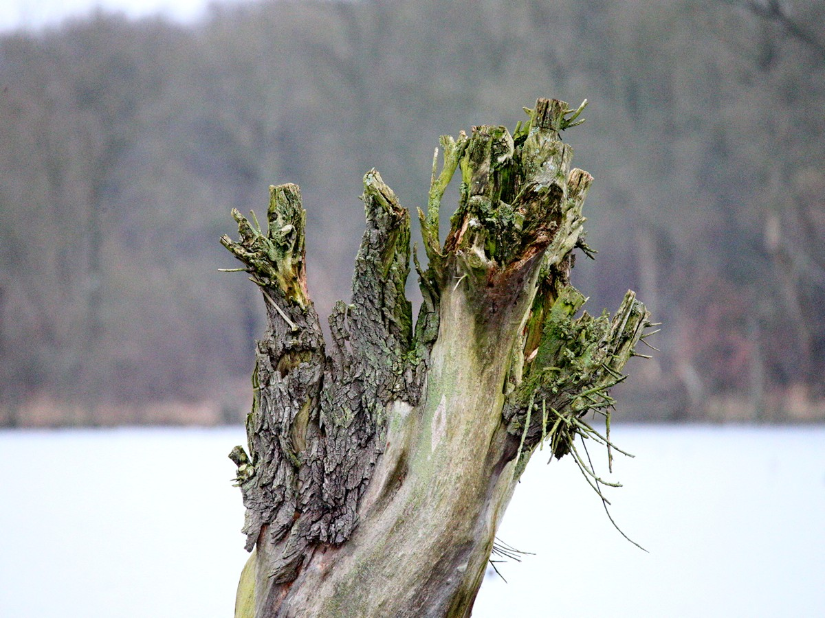 Verrottender Baumstumpf in Mecklenburg